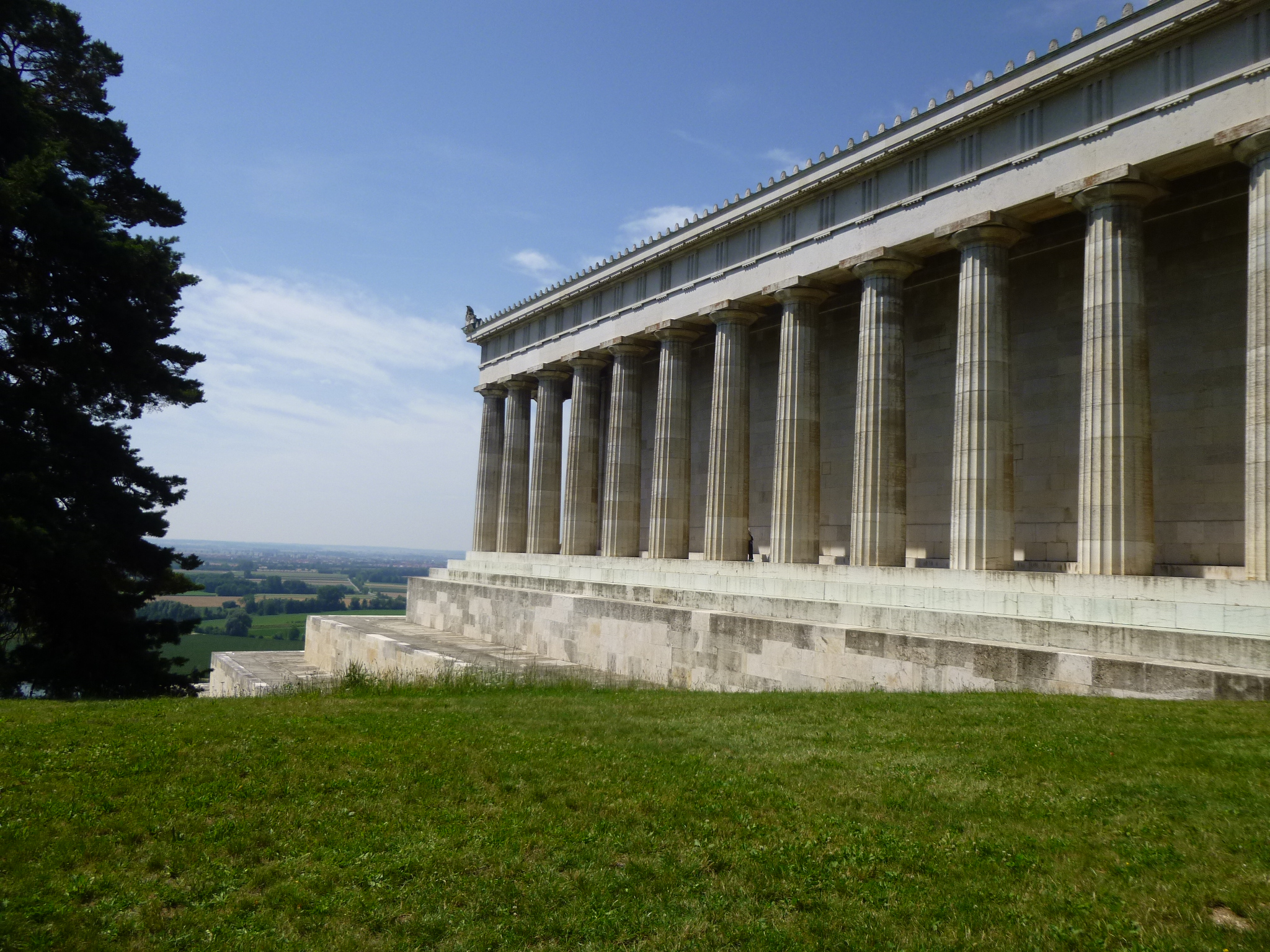 Die Ostansicht der Walhalla in Donaustauf, Landkreis Regensburg.This is a photograph of an architectural monument.